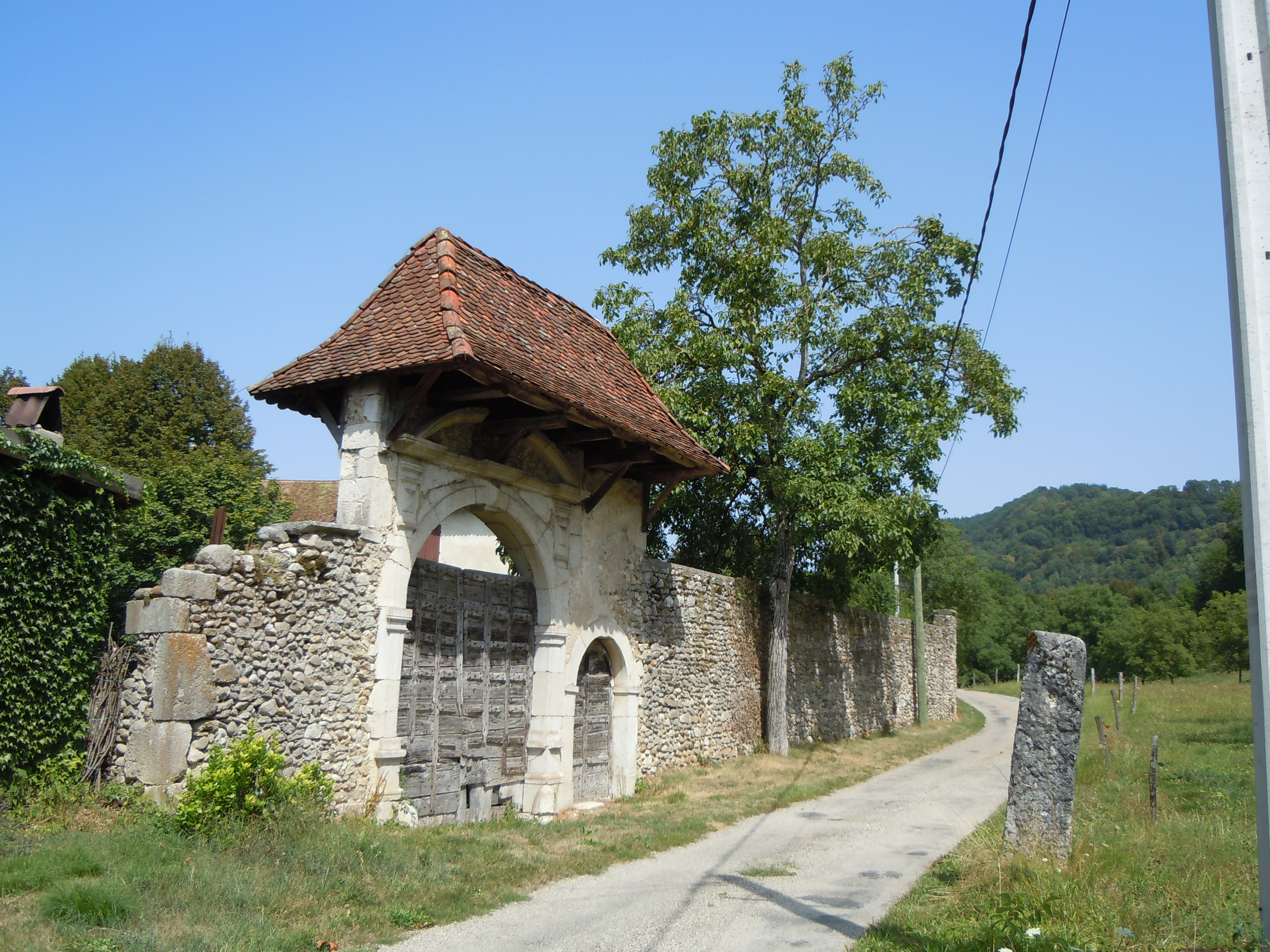 Portail du Chateau de Voissant